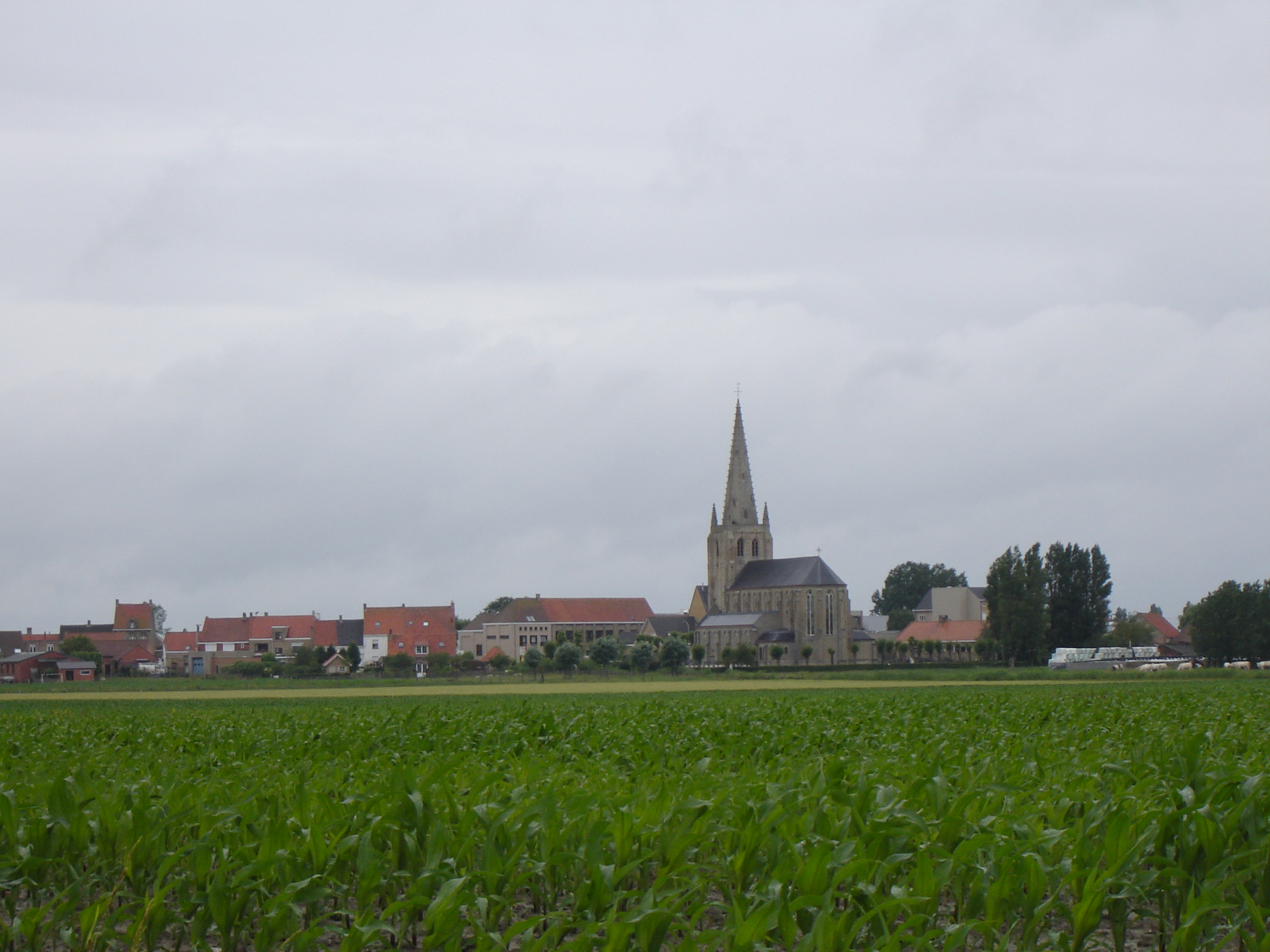 Uitzicht op Bulskamp. Overview on Bulskamp, Veurne, Belgium